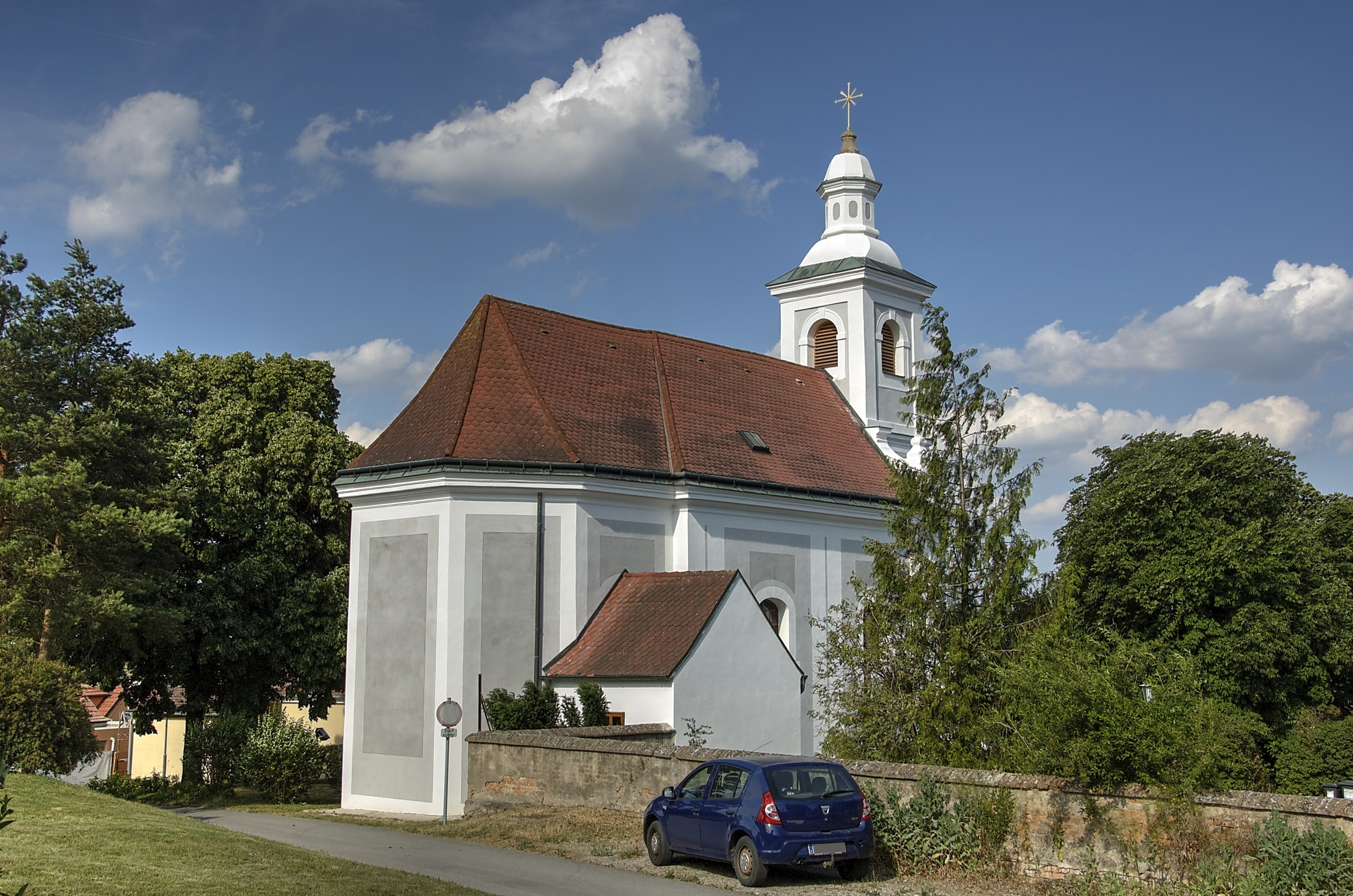 Kath. Filialkirche hl. Michael